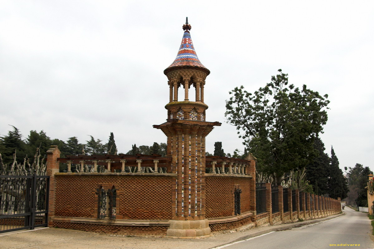 Casa Garí (Argentona-Maresme-Catalunya), obra de Josep Puig i Cadafalch 1898. Tanca de la porta d'acces principal.